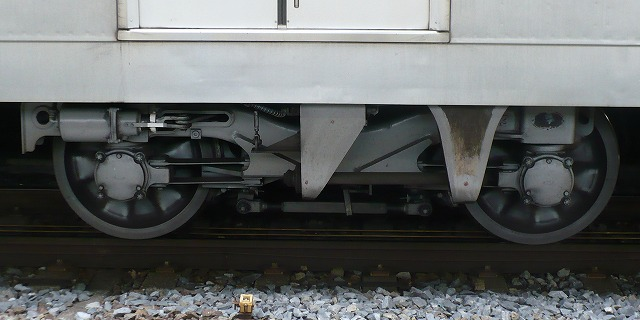 地下鉄6000系の台車